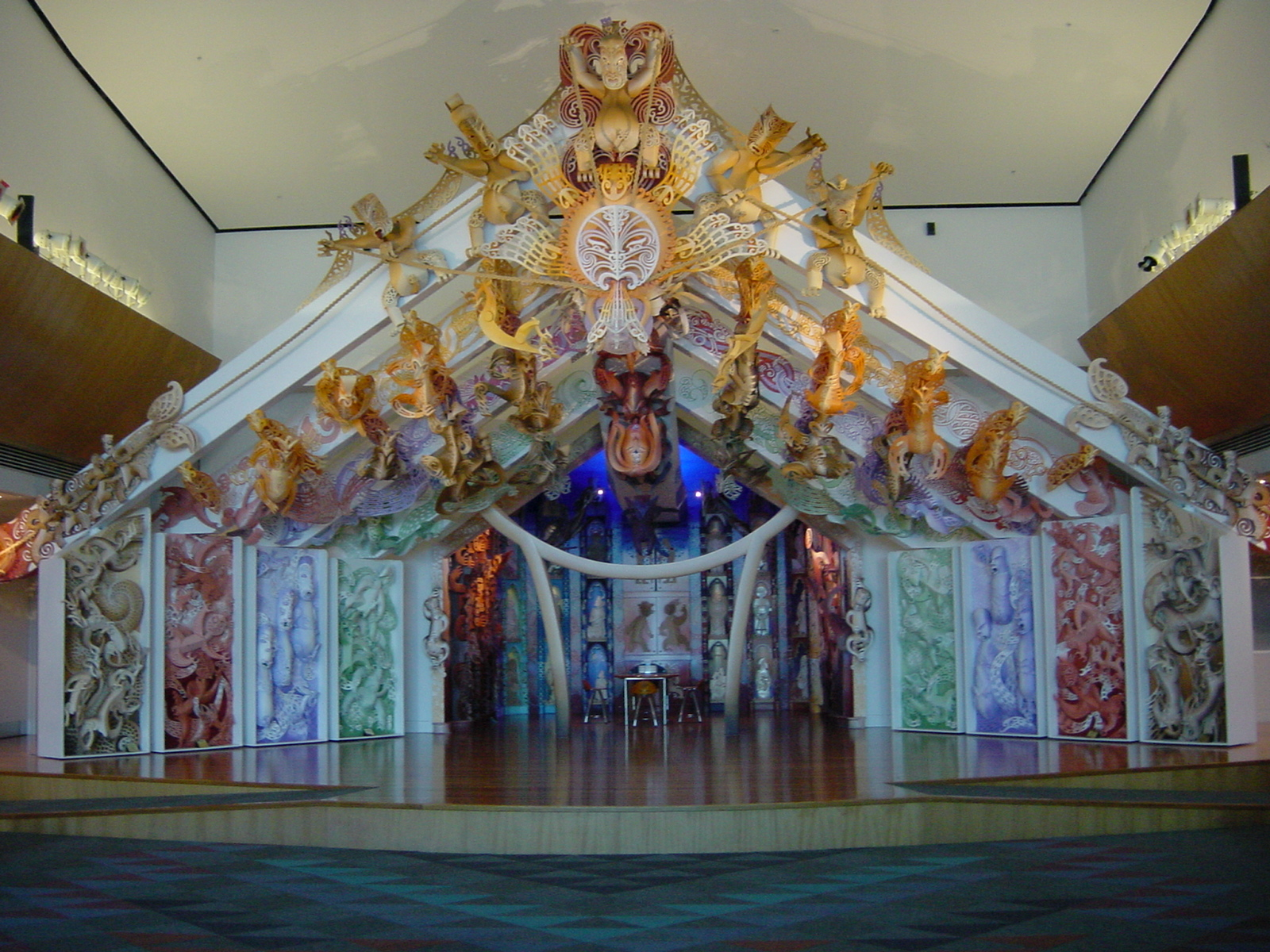 2001-12-02 01-03 Neuseeland 152